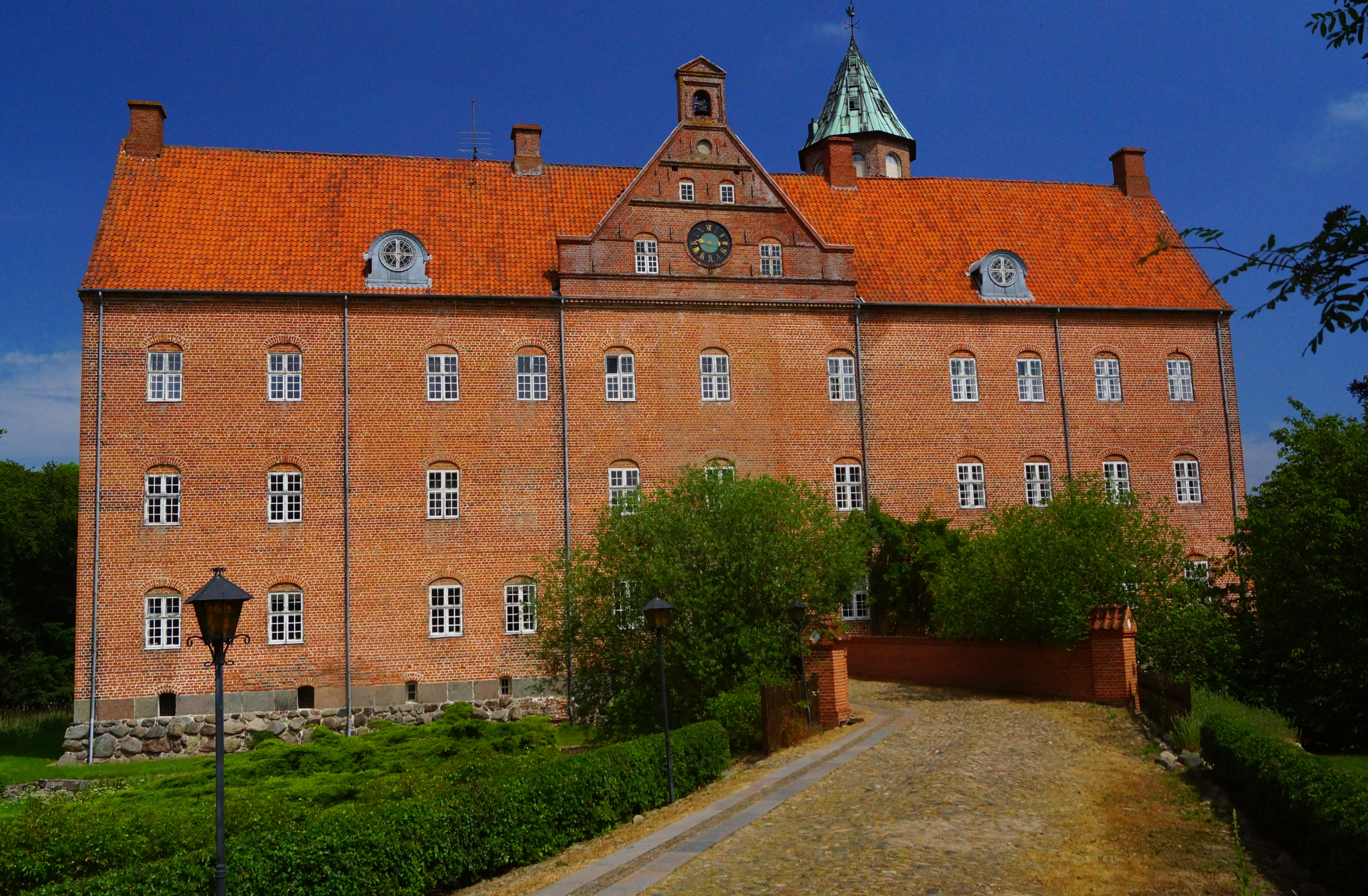 Sostrup Slot, Norddjursland